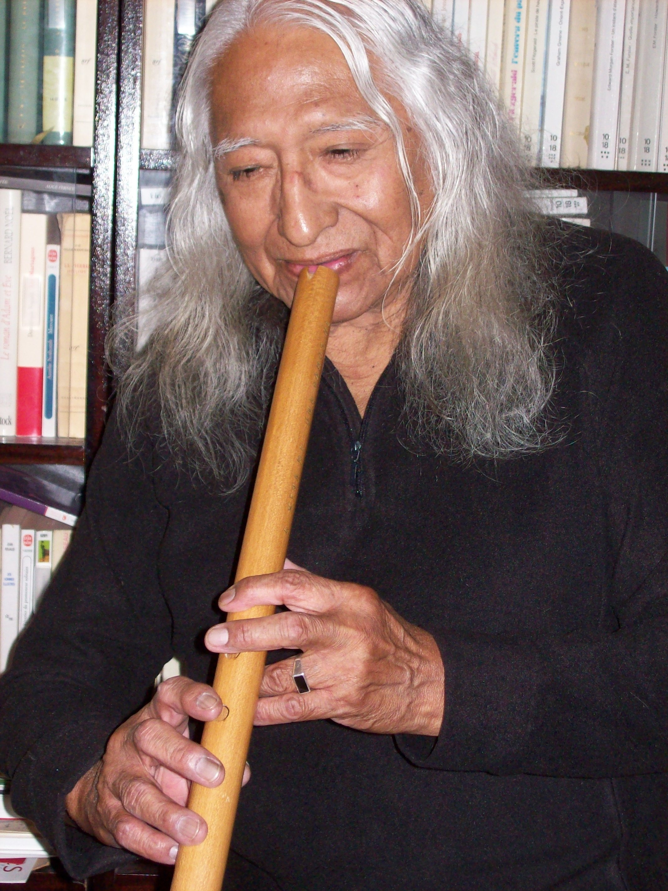 Uña Ramos et la kena